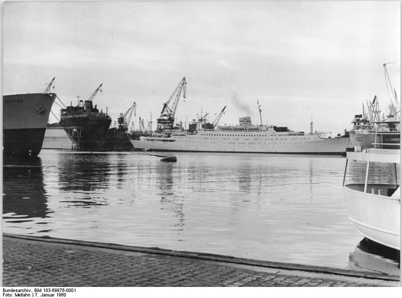 Zentralbild Mellahn-7.1.1960 FDGB-Urlauberschiff von Probefahrt zurück. Das erste FDGB-Urlauberschiff, die "Völkerfreundschaft" kehrte am 6.1.1960 von ihrer Übernahmefahrt in den Göteborger Hafen zurück. Kapitän und Mannschaft sind mit dem Schiff sehr zufrieden. UBz: Die "Völkerfreundschaft" im Göteborger Hafen.